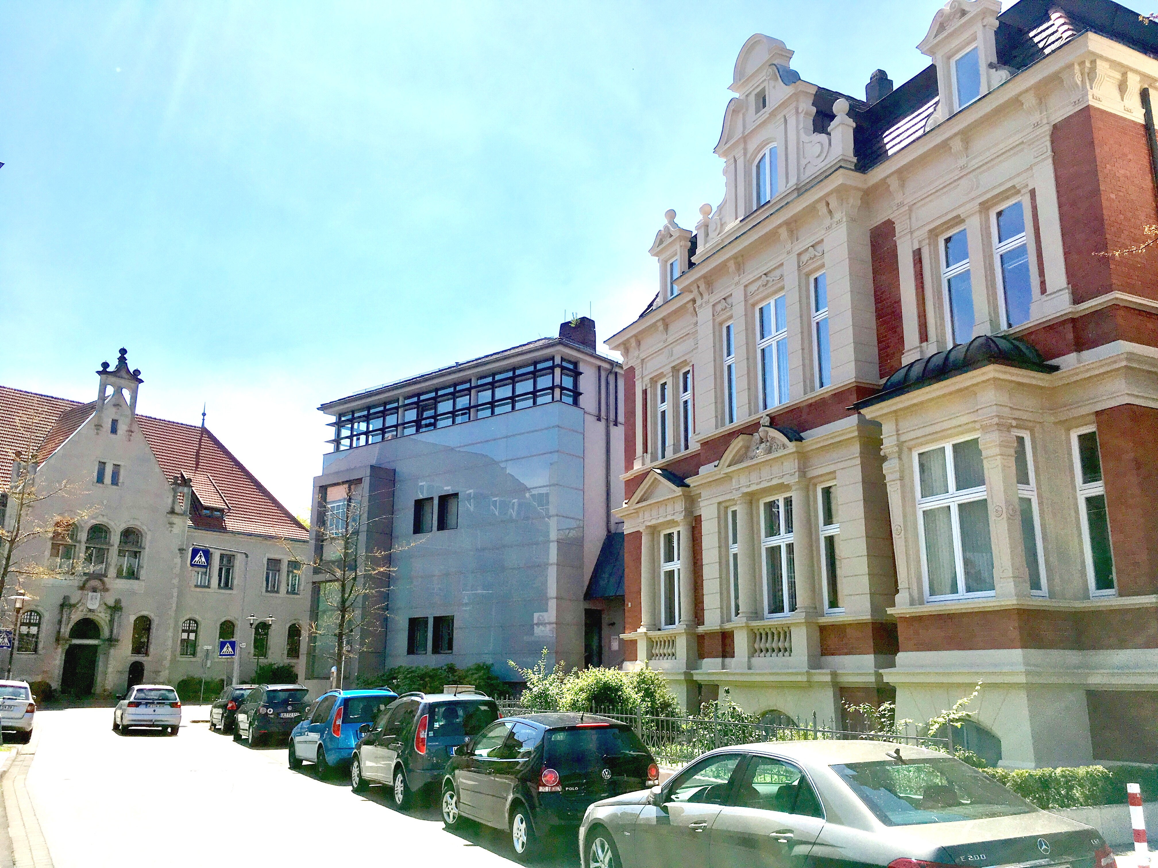 Einmündung der Ringstraße in die Veerßer Straße in Uelzen